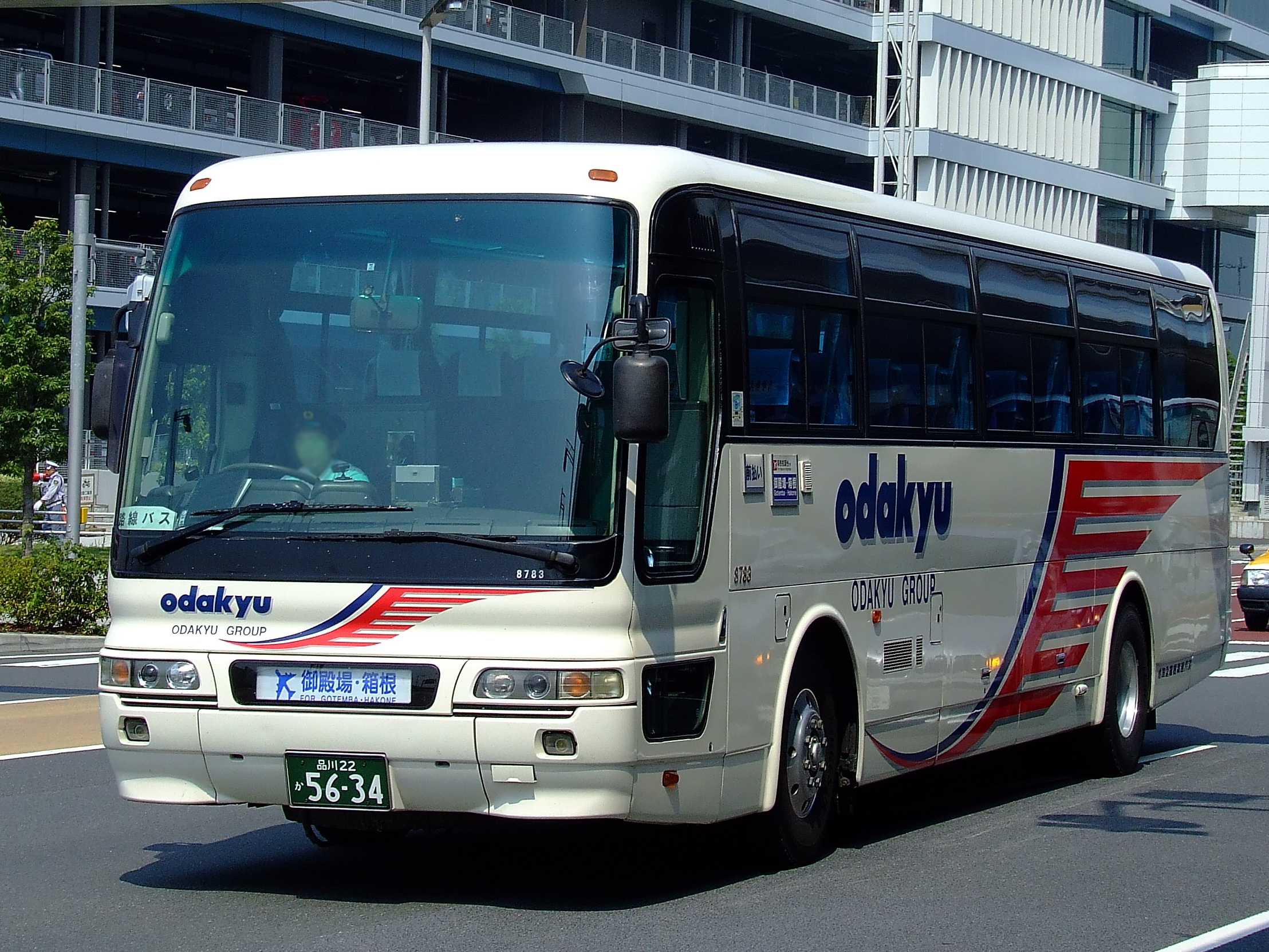 小田急箱根高速バスが運行する羽田・横浜～御殿場・箱根線 羽田空港にて